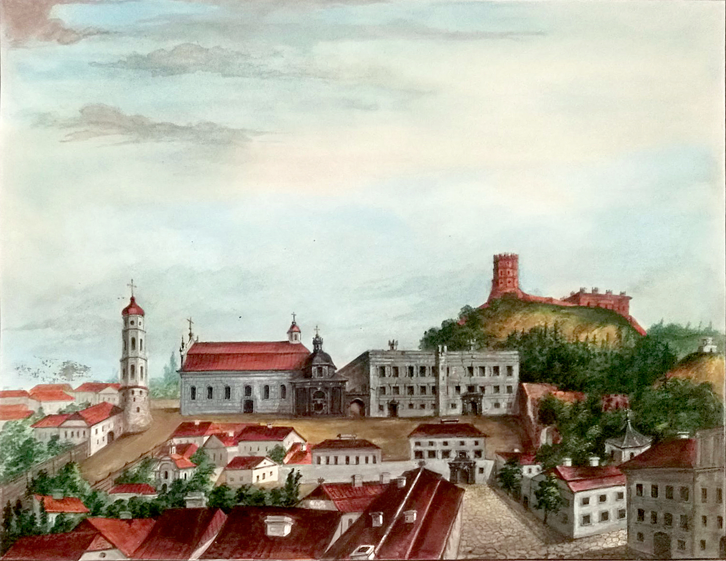 Беларуская (тарашкевіца): Вільня (Vilnia), вуліца Замкавая (vulica Zamkavaja) у бок пляцу Катэдральнага (plac Katedralny)